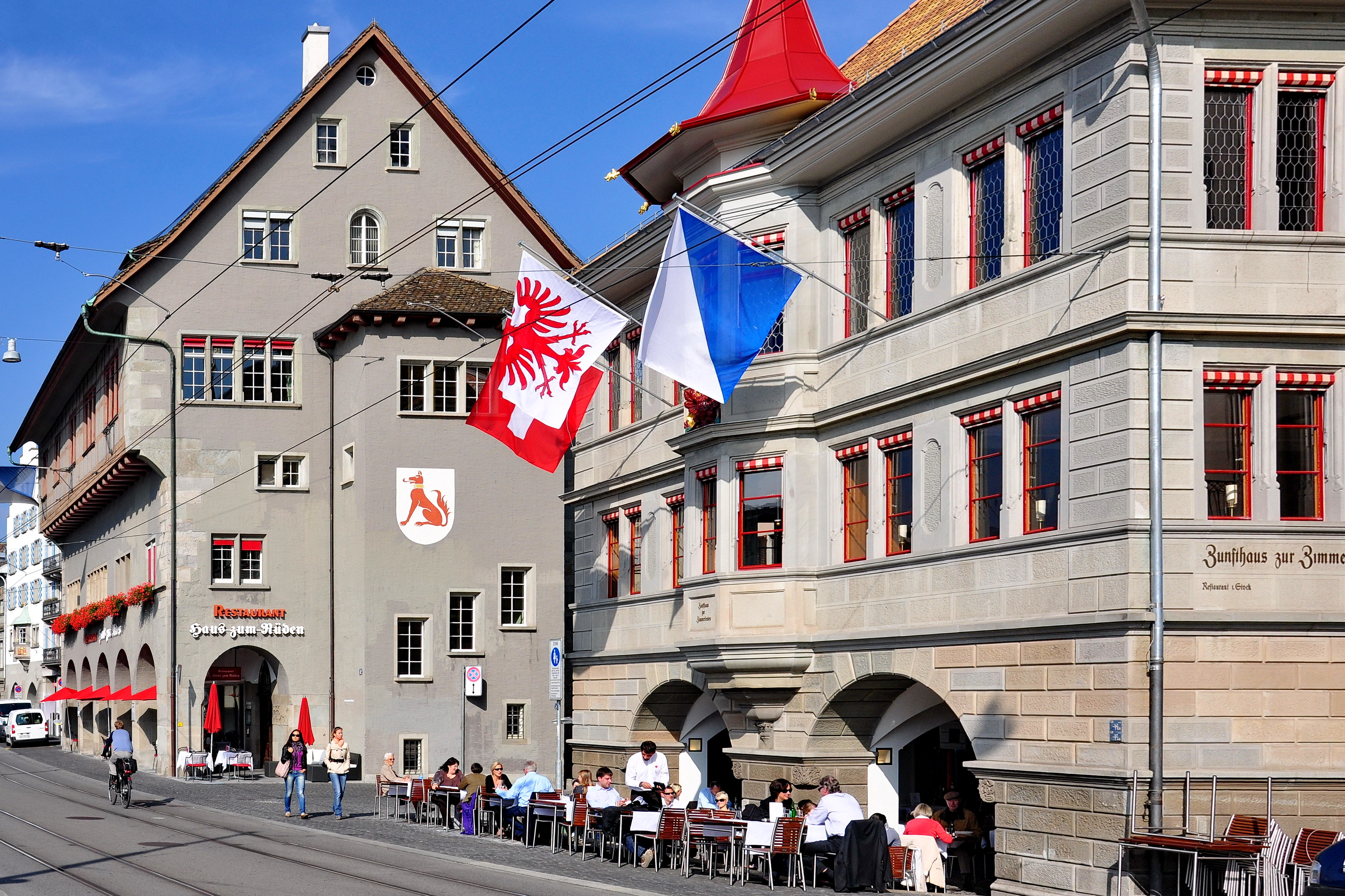 Haus zum Rüden and Zunfthaus zur Zimmerleuten – rebuilt and newly inaugurated in October 2010 – at Limmatquai in Zürich (Switzerland), as seen from Limmatquai towards Wasserkirche, Zunfthaus zur Haue in the background to the left.